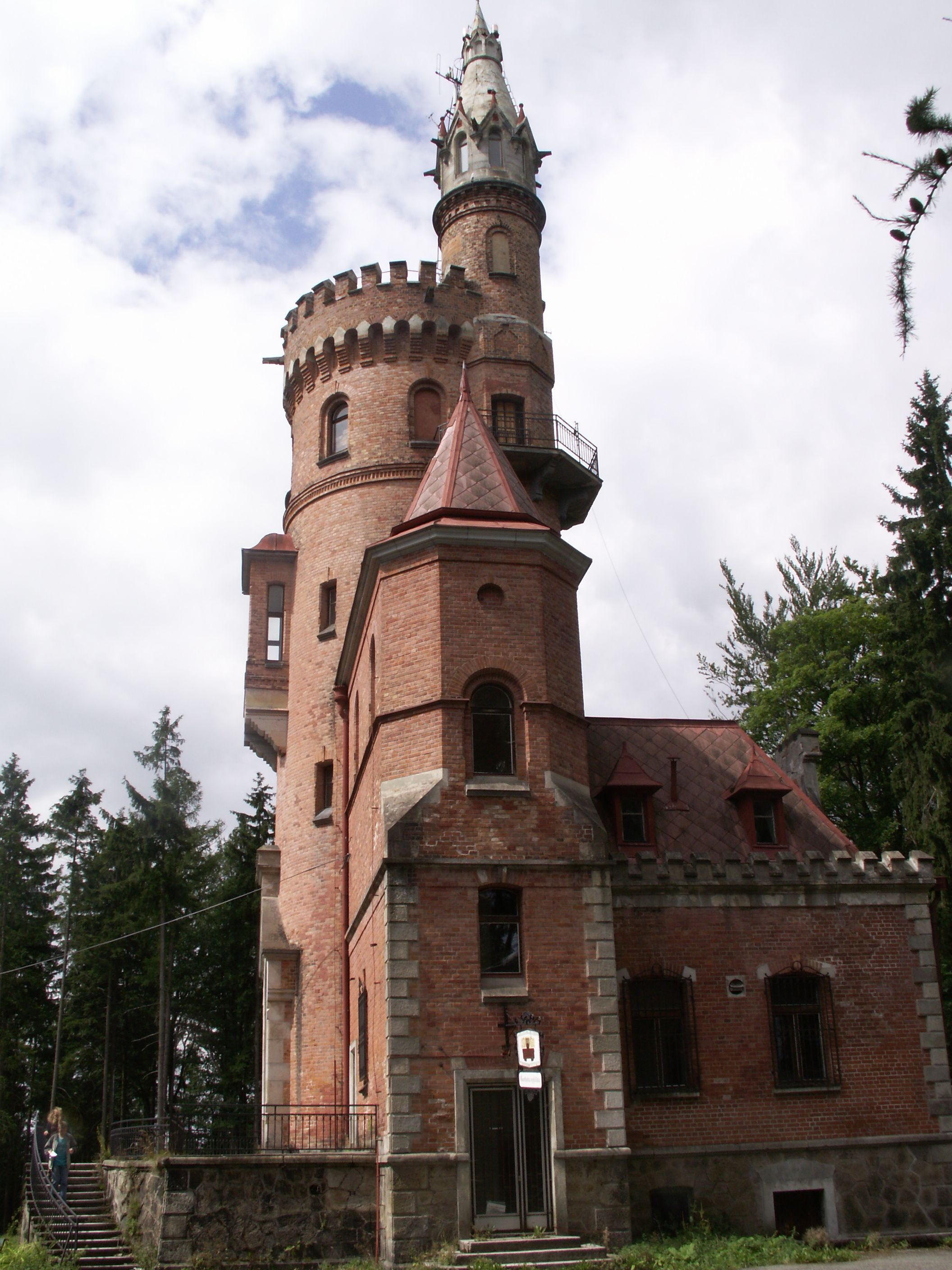 Goethova vyhlídka v Karlových Varech